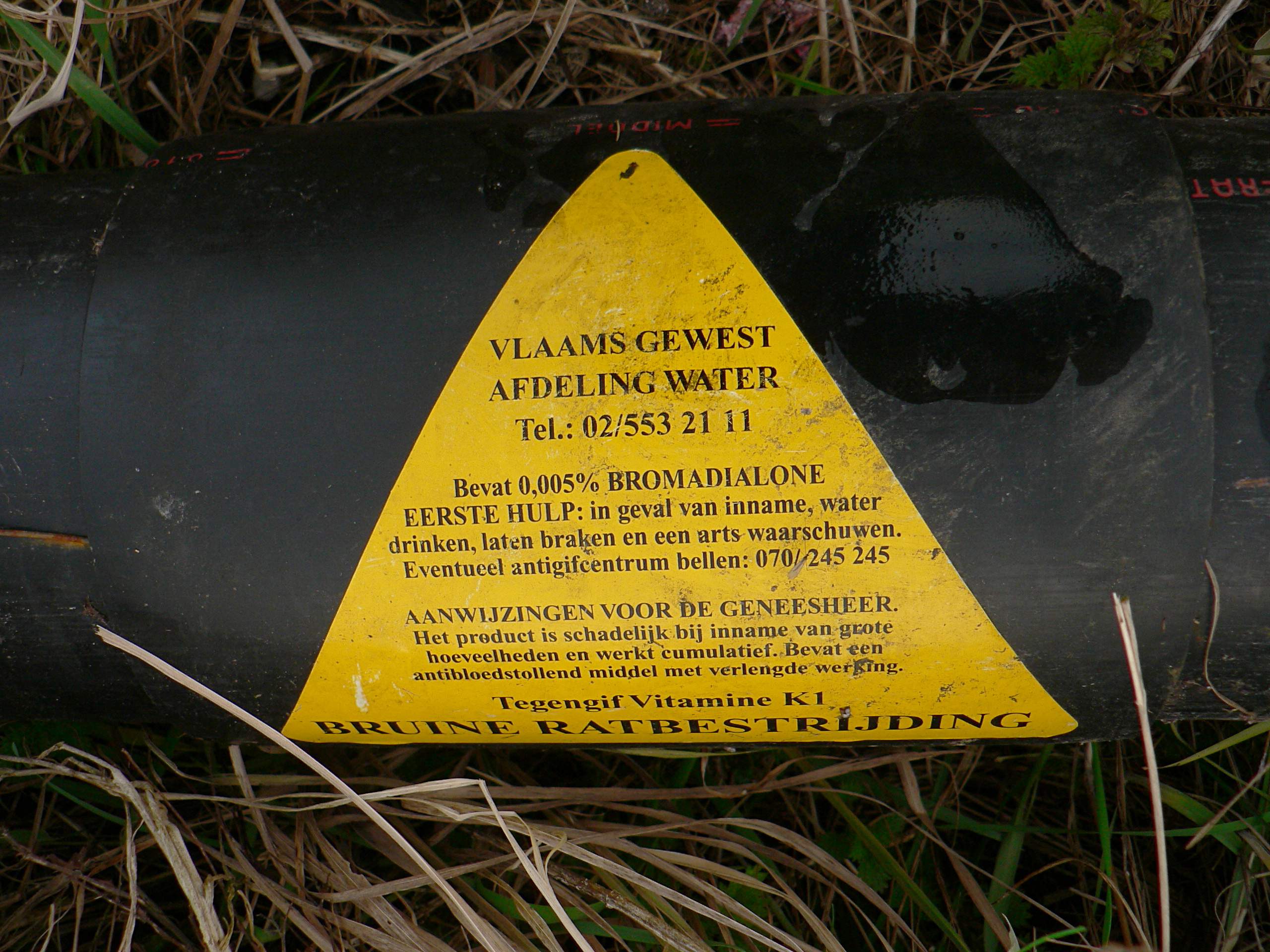 rat poison on the Schelde river dike, Steendorp, Belgium VLAAMS GEWEST AFDELING WATER Tel.: 02/553 21 11 Bevat 0,005% BROMADIALONE EERSTE HULP: in geval van inname, water drinken, laten braken en een arts waarschuwen. Eventueel antigifcentrum bellen: 070/245 245 AANWIJZINGEN VOOR DE GENEESHEER. Het product is schadelijk bij inname van grote hoeveelheden en werkt cumulatief. Bevat een antibloedstollend middel met verlengde werking. Tegengif Vitamine K1 BRUINE RATBESTRIJDING FLEMISH REGION DEPARTMENT WATER Tel.: 02/553 21 11 Contains 0.005% BROMADIALONE FIRST AID: in case of ingestion, drink water, induce vomiting and notify a physician. Call poison control center when necessary: 070/245 245 DIRECTIONS FOR PHYSICIAN. The product is harmful when ingested in large quantities and has a cumulative effect. Contains an anticoagulant with prolonged activity. Antidote Vitamin K1 BROWN RAT DESTRUCTION